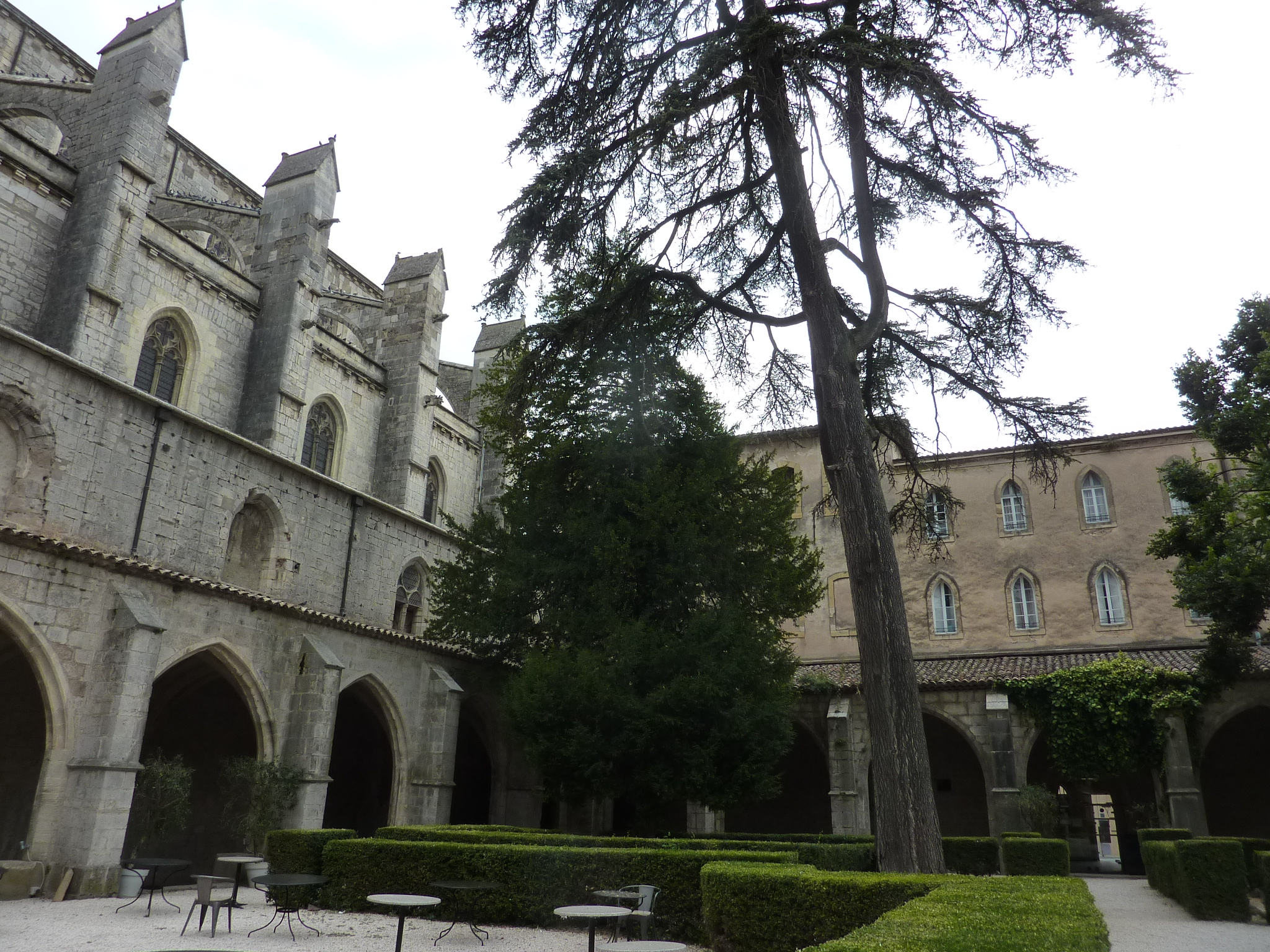 Couvent des Dominicains de Saint-Maximin-la-Sainte-Baume